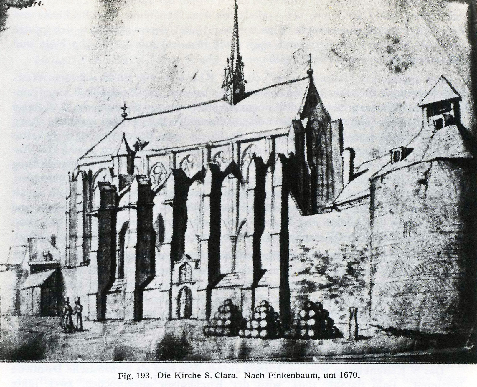 Köln, St. Klara. Zeichnung aus dem Skizzenbuch des Justus Vinckenboon um 1660/70